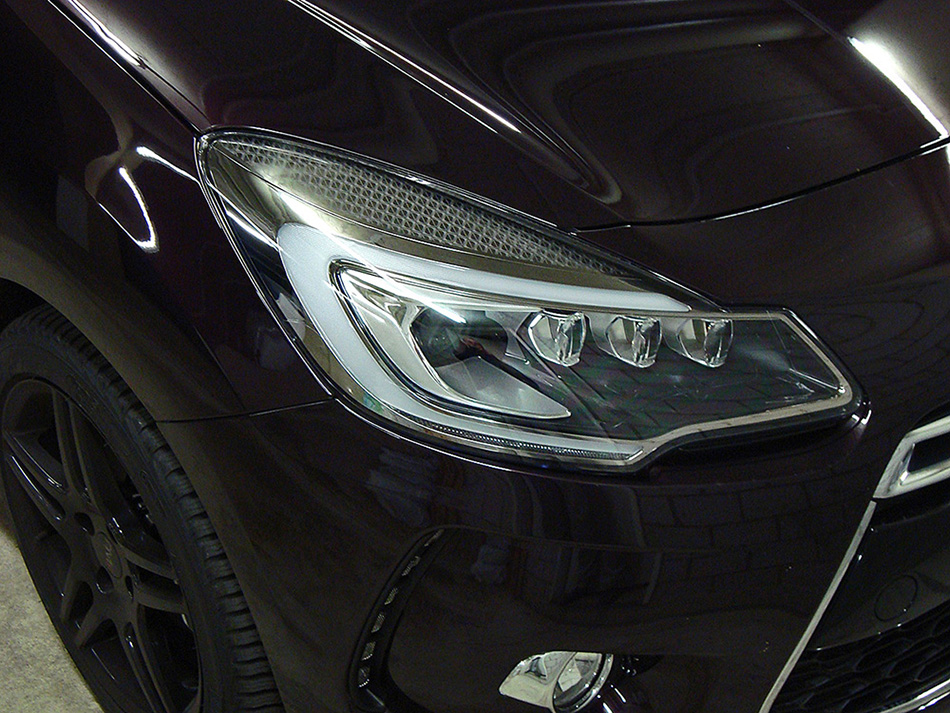 1.6 THP 165 Stop&Start 6-Gang-Manuell.